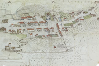 Der Aufbauplan von Johann Baptist Ludwig Gallati für das brandzerstörte Sargans 1811